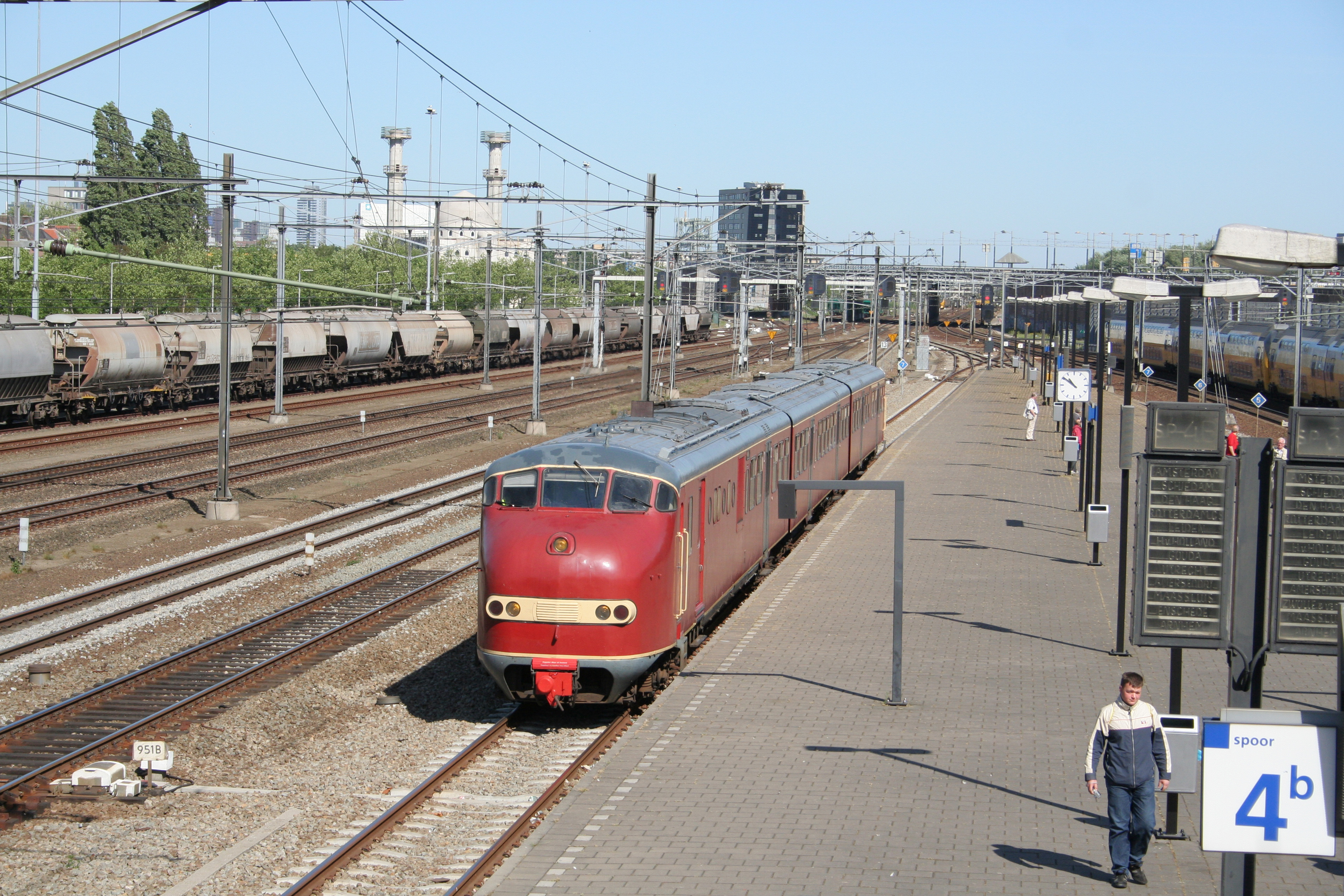 Plan U te Rotterdam Stadion.